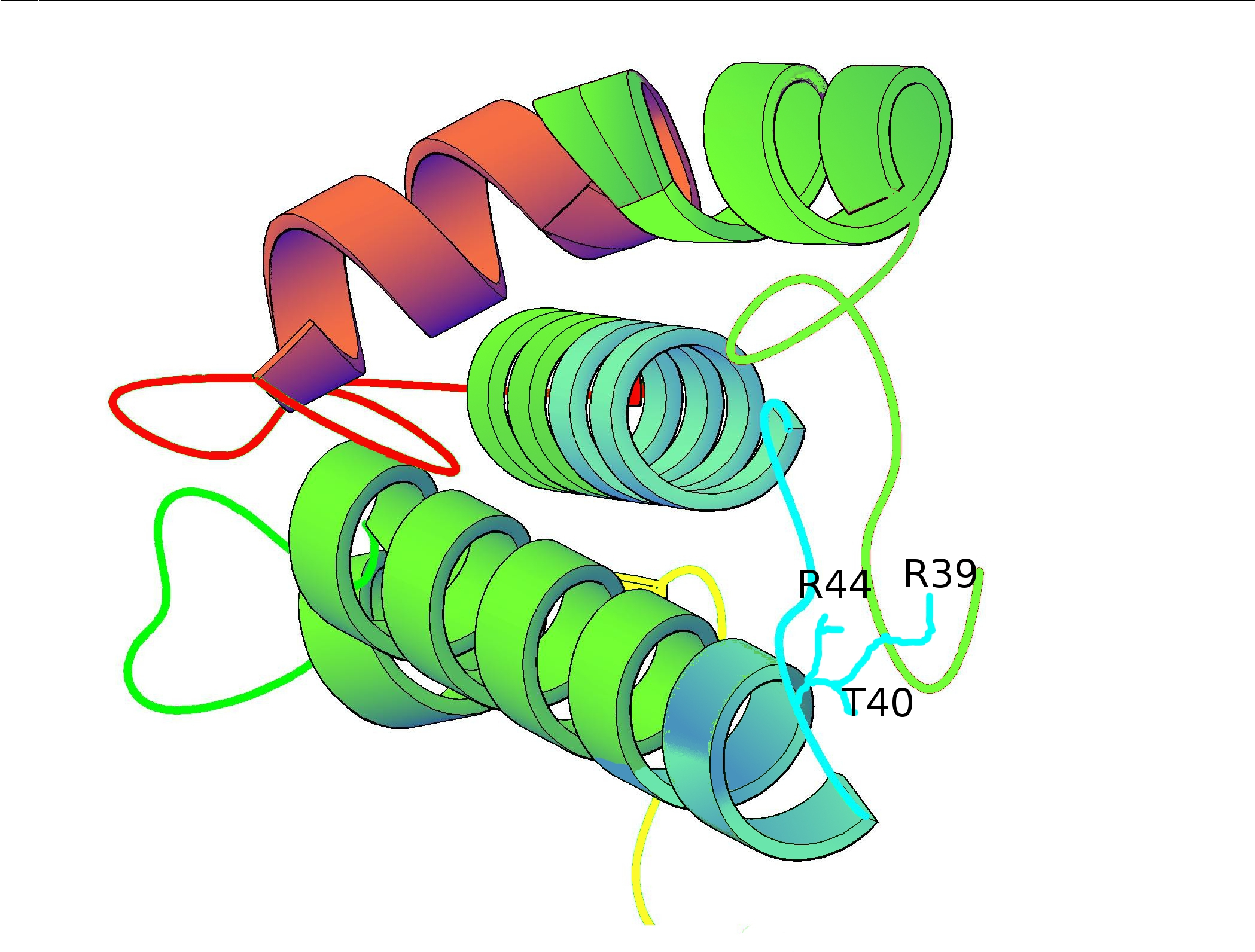 Estructura de la Proteïna Transportadora de Lípids de les plantes Pru p 3 (91 AA), present al préssec Mostra tres epítops o determinants antigèncis a les seqüències lineals: 11-25 (groc), 31-45 (blau), and 71-80 (vermell). Les cadenes dels residus 39, 40 i 44 del segon epítop també estan representades.